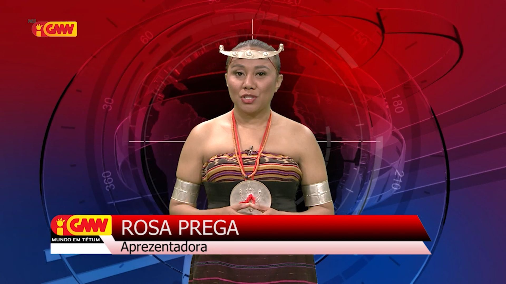 Mundu iha Tetum 06 de Junho 2020 - GMN TV